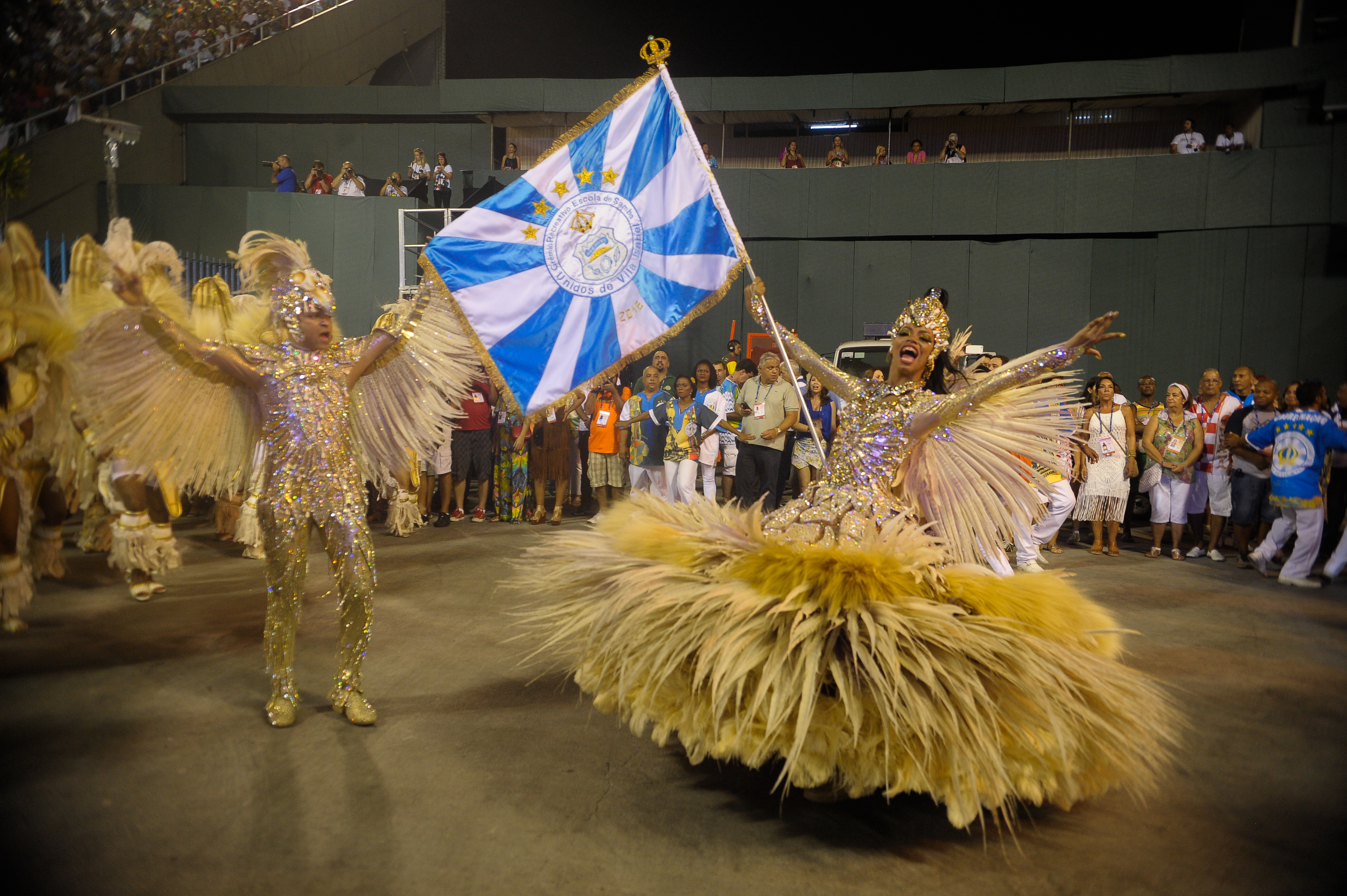 Rio de Janeiro - Primeira escola do segundo dia de desfile na Marquês de Sapucaí, a Vila Isabel abre a noite com uma homenagem a Miguel Arraes, ex-governador de Pernambuco (Tomaz Silva/Agência Brasil)